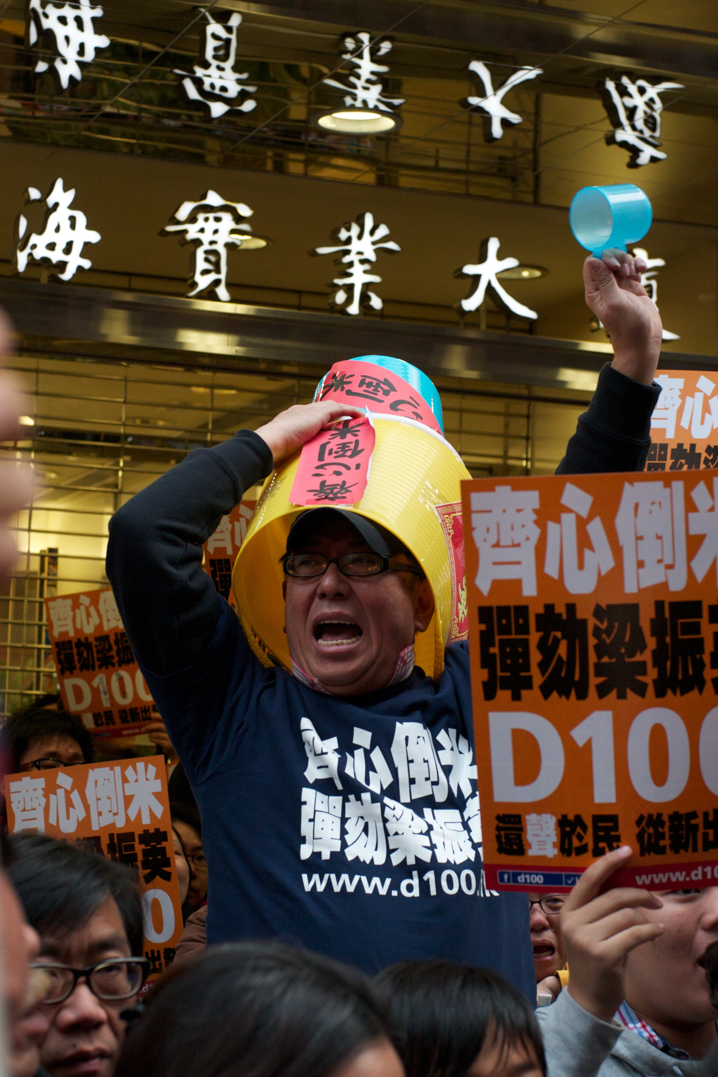 中文（香港）: D100主持樓南光，在2013年元旦大遊行灣仔街站